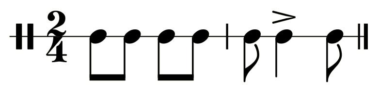 Ritmo della Krakowiak: danza nazionale polacca in 2/4